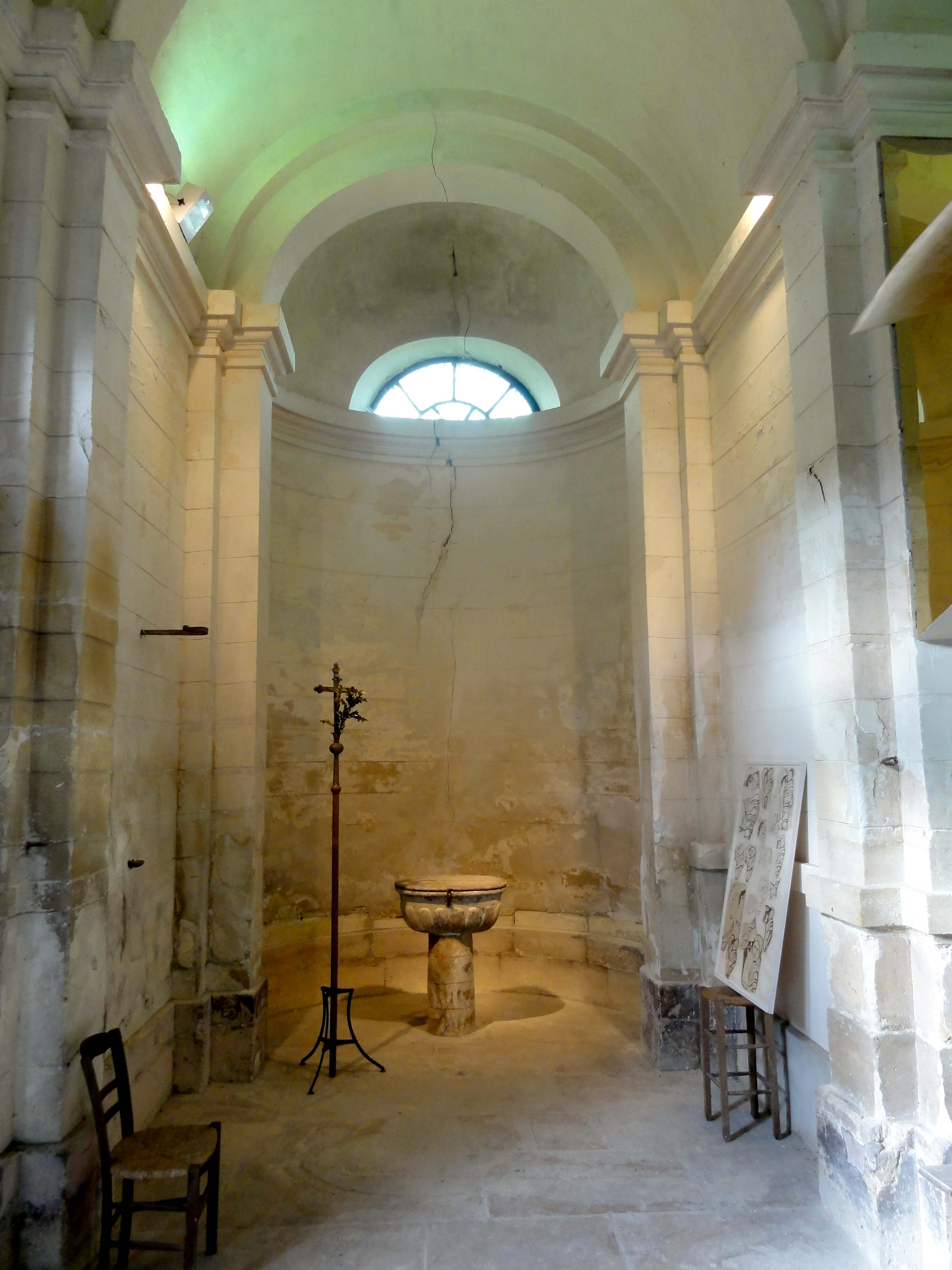 Narthex, vue vers le nord - chapelle baptismale.